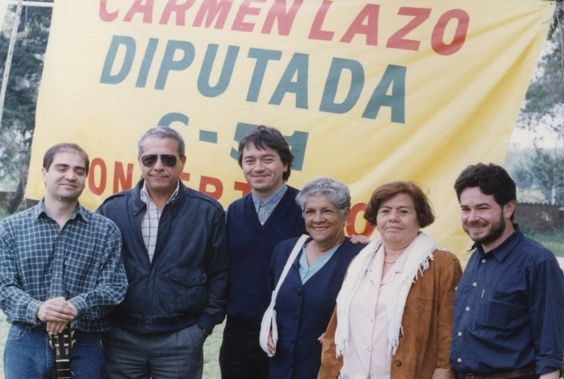 Carmen Lazo en manifestación durante su campaña parlamentaria de 1997.